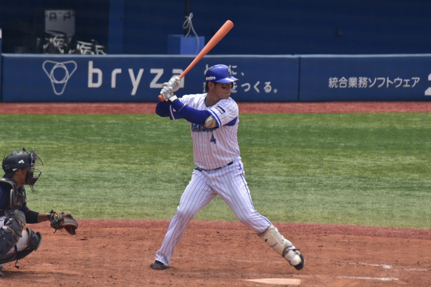 横浜DeNAベイスターズ背番号4 伊藤裕季也内野手。 2019年6月21日、横浜スタジアムにて撮影。